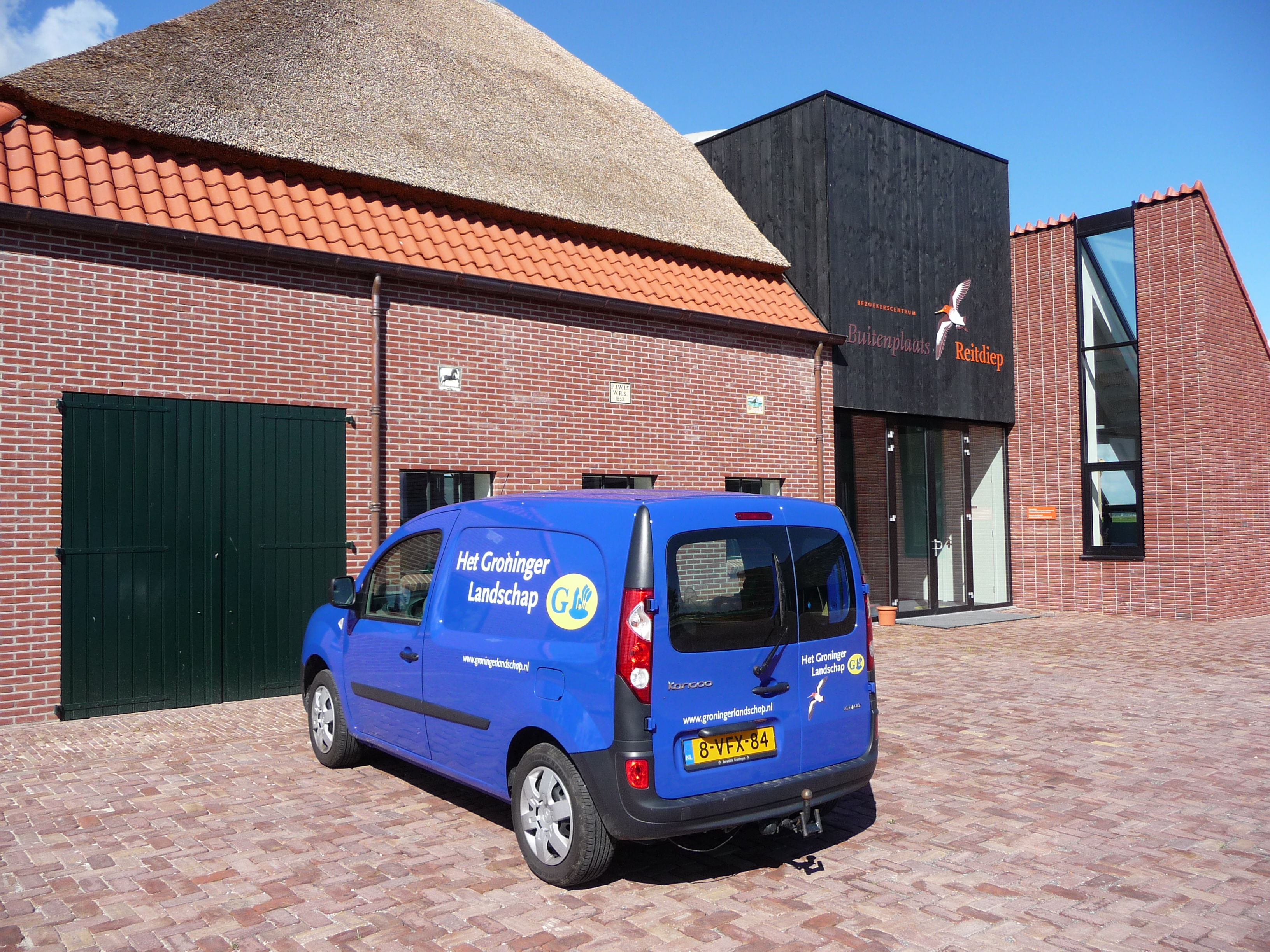 Noorderhoogerbrug (Groningen)